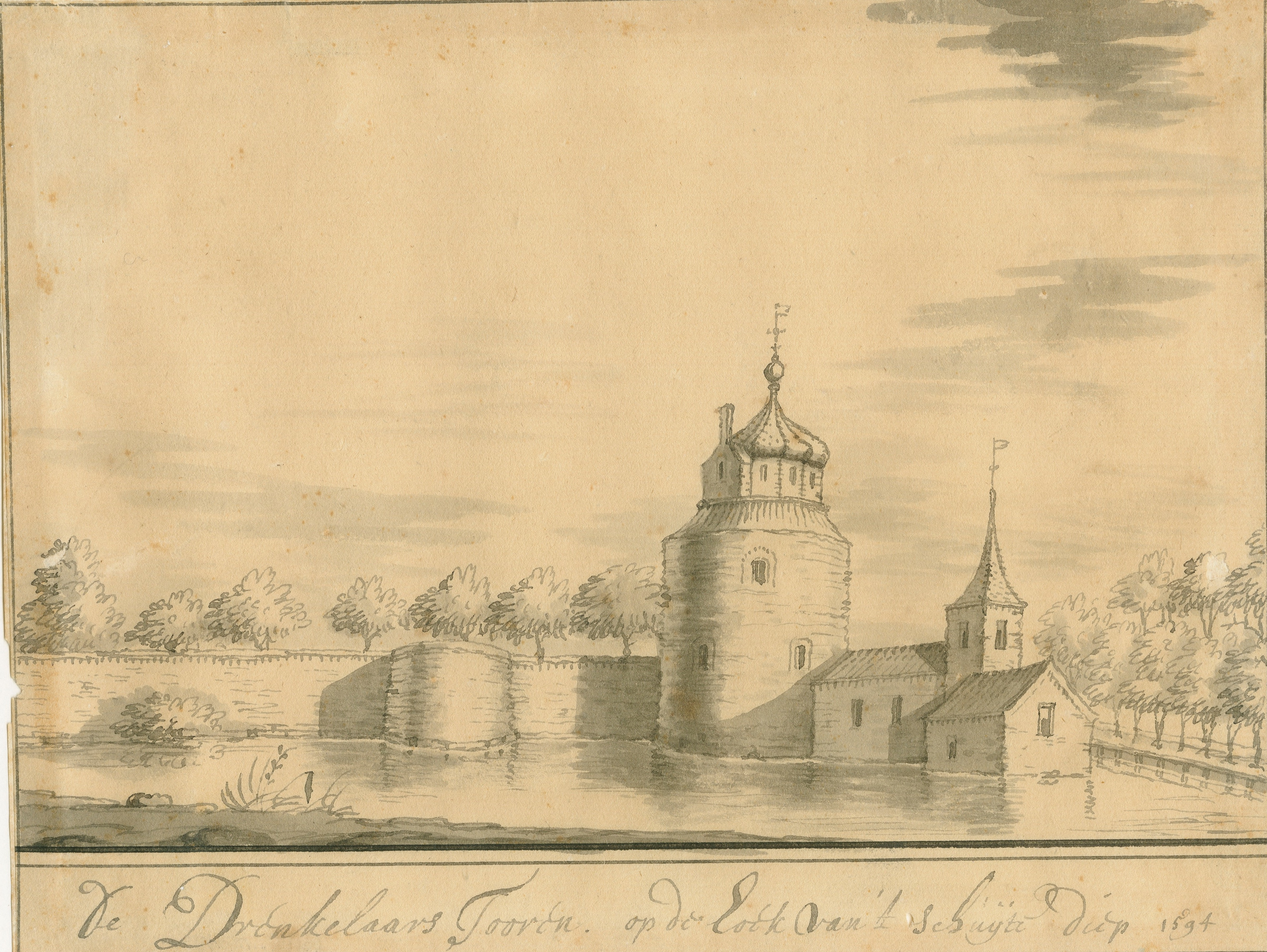 De Drenkelaarstoren op een tekening van Jacobus Stellingwerf. Het onderschrift luidt 'De Drenkelaars tooren op de hoek van 't Schuijte diep 1594'.